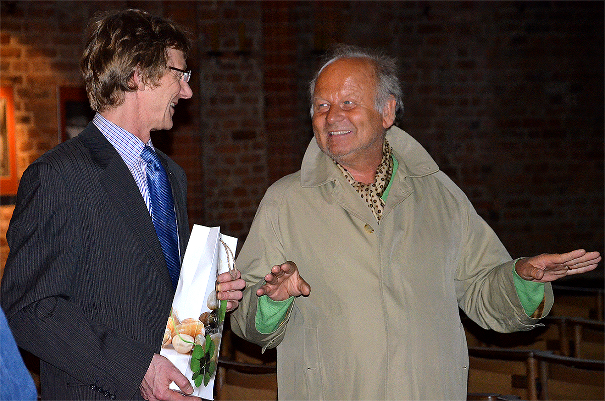 In der VeranstaltungPresse Club vor Ort: Marktkirche des Presse Club Hannover besuchten Mitglieder und Gäste die Marktkirche in Hannover, wo ihnen der Organist Ulfert Smidt, zugleich künstlerischer Leiter der internationalen Orgelkonzertreihe und Dozent an der Hochschule für Musik, Theater und Medien Hannover die drei Orgeln der Kirche verbal und musikalisch vorstellte ...